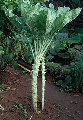 Boerkool is 'n vorm van kool (Brassica oleracea acephala), groen of pers, wat nie 'n kop vorm nie